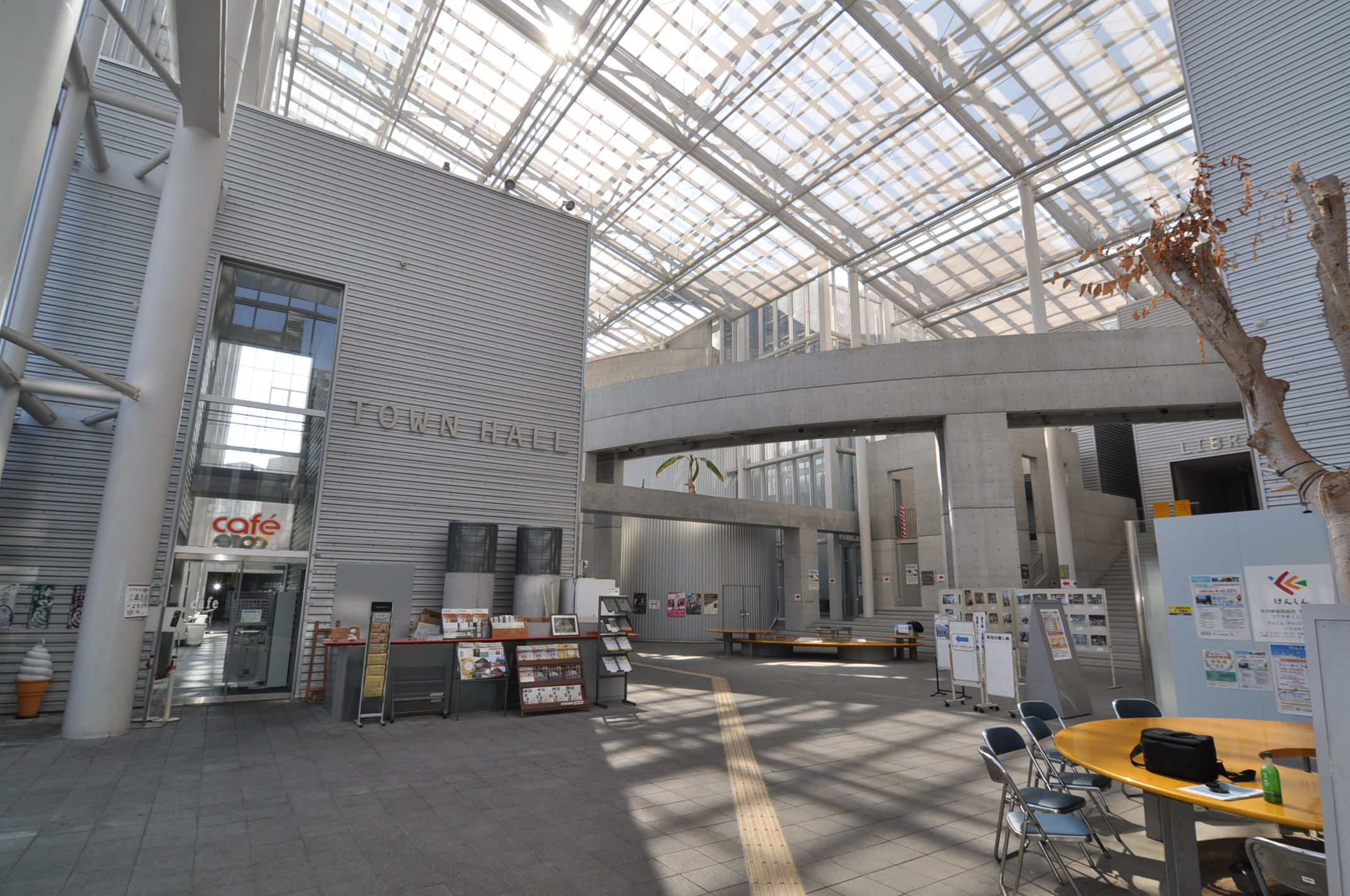 天井に広がるガラス張り、奥行きを感じる吹き抜け仕様など、解放的な空間となっています。